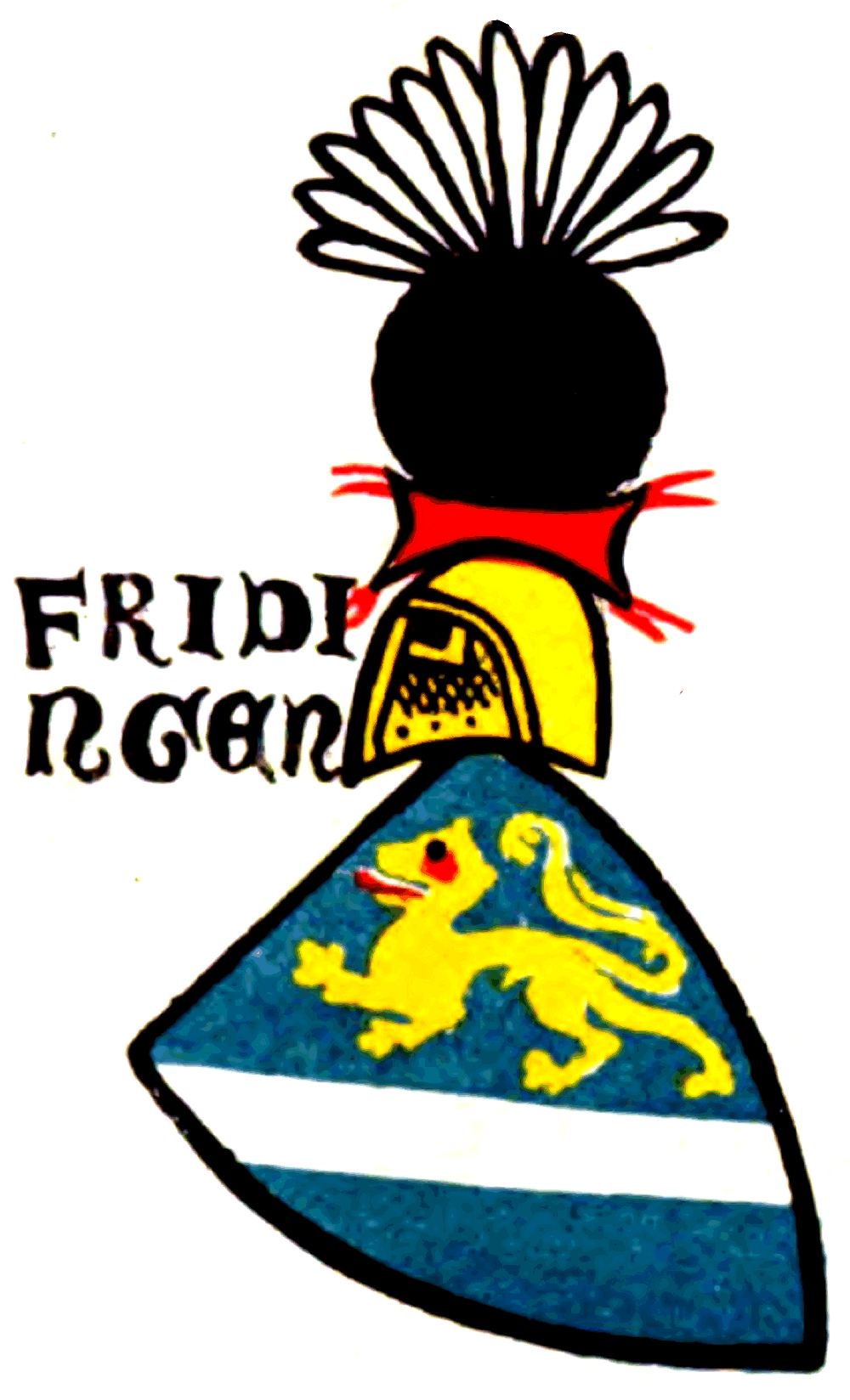 Wappen der Friedingen (hier Fridingen)